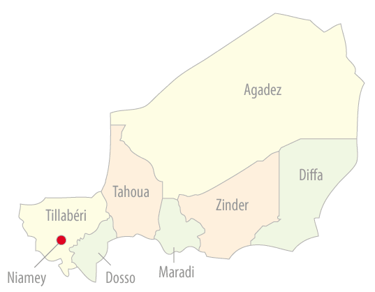 Niger departmens